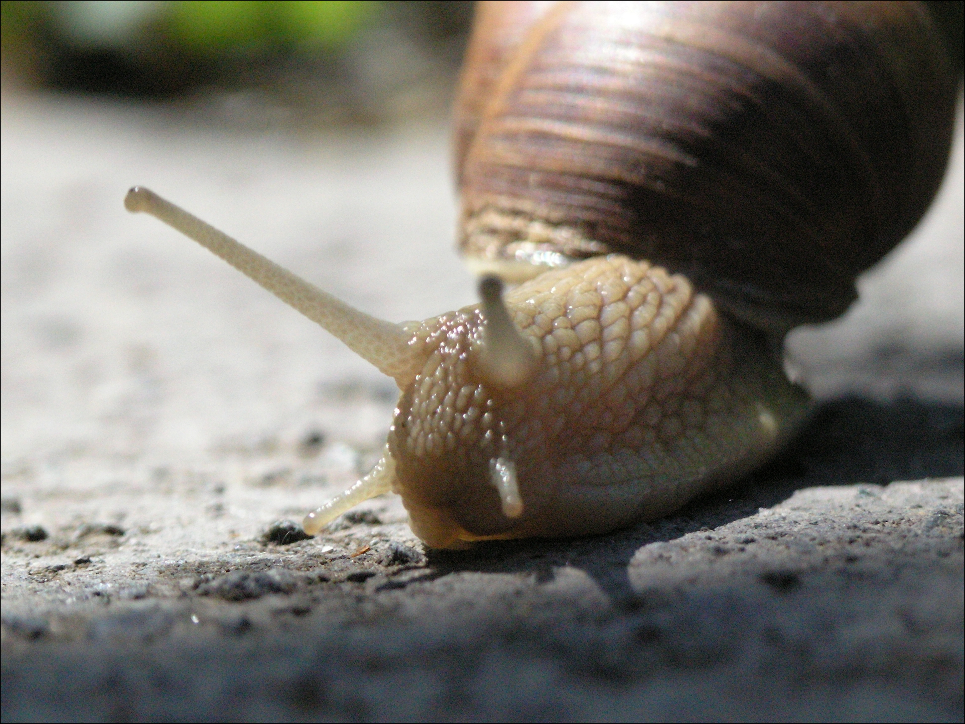 Helix pomatia - Hlemýžď zahradní